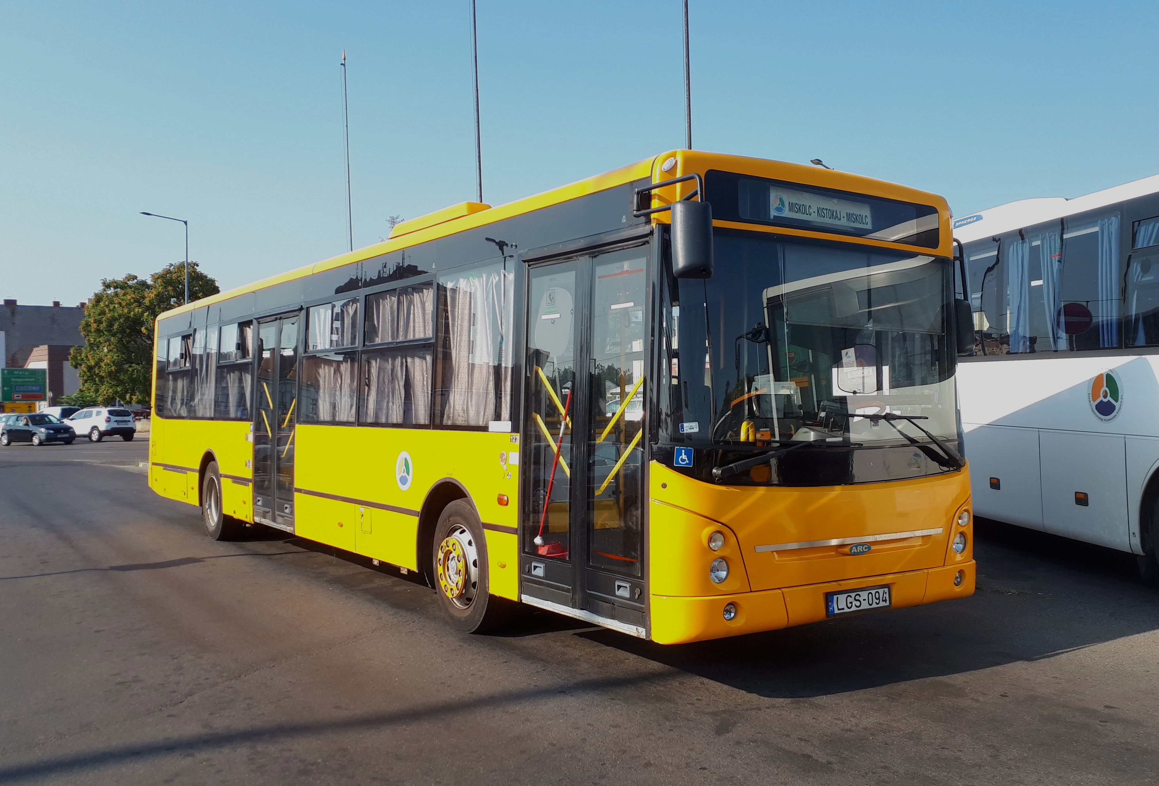 Az ÉMKK LGS-094 rendszámú Ikarus-ARC E127 típusú busza Miskolcon, a 3738-as helyközi járaton.